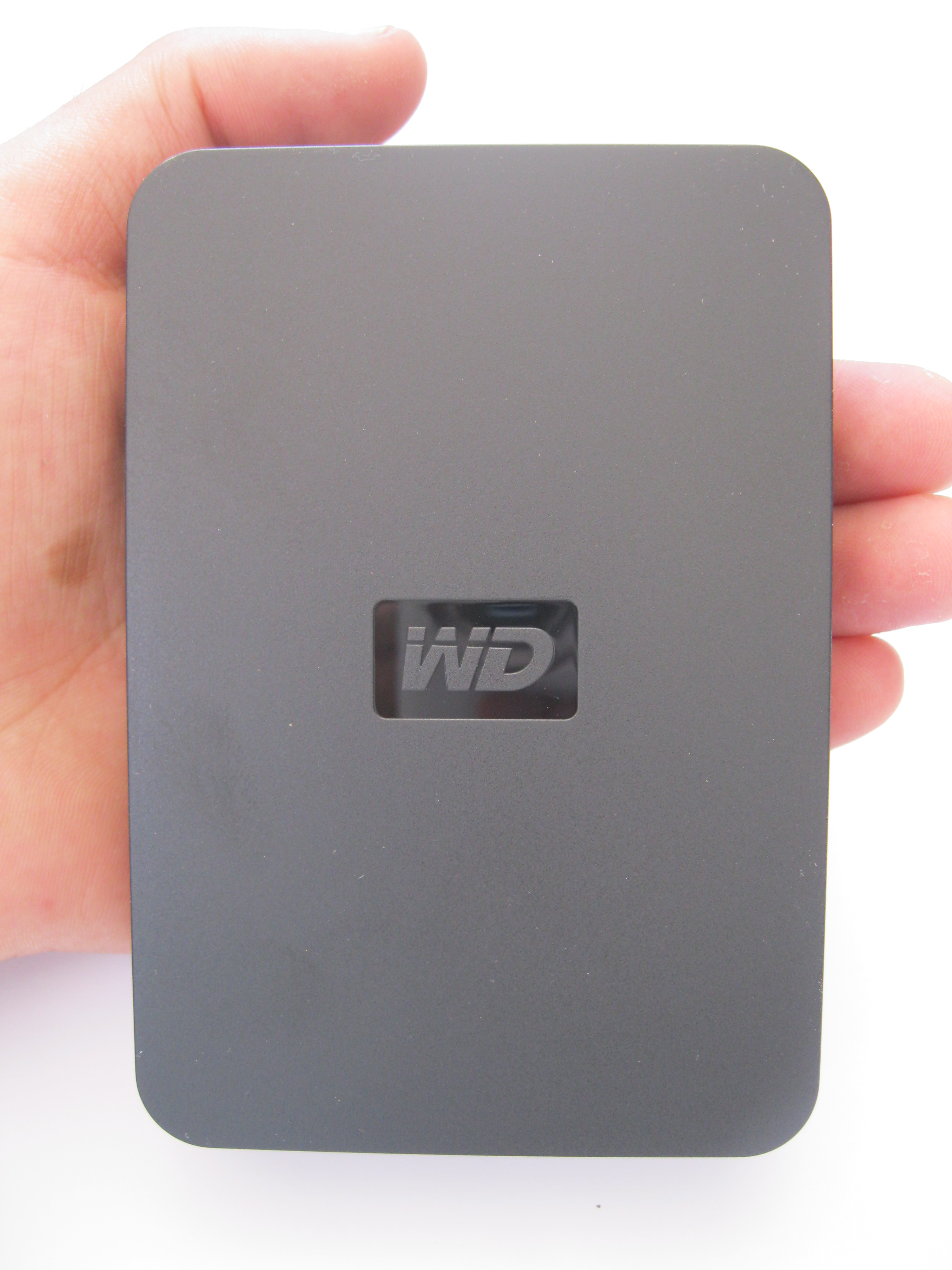 Western Digital 500 gb